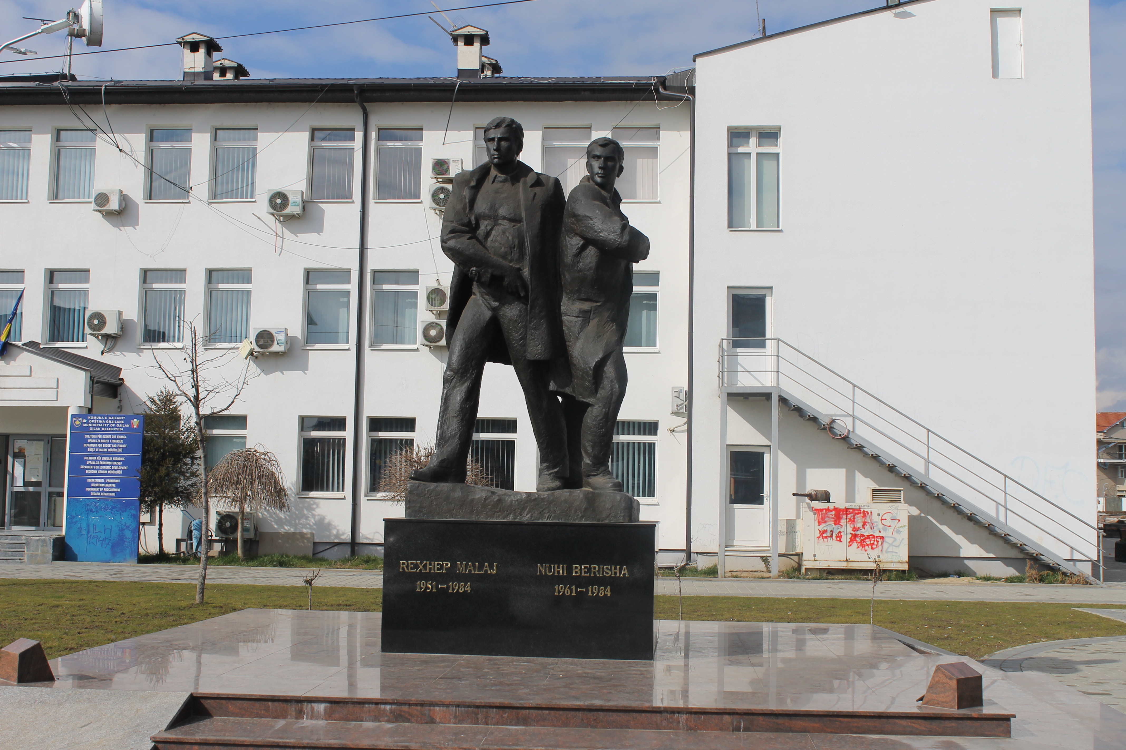 Permendorja e Rexhep Malaj dhe Nuhi Berishës , në qendër të Gjilanit.